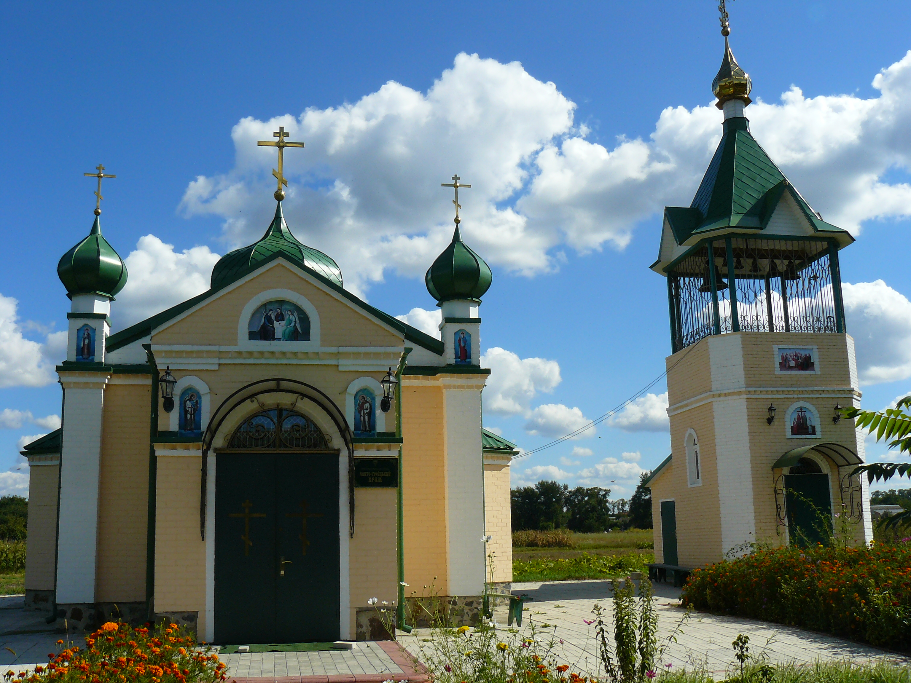 Великий Карашин. Церква і дзвінниця